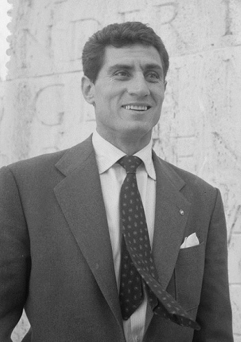 Lefter Küçükandonyadis Amsterdam'dayken.